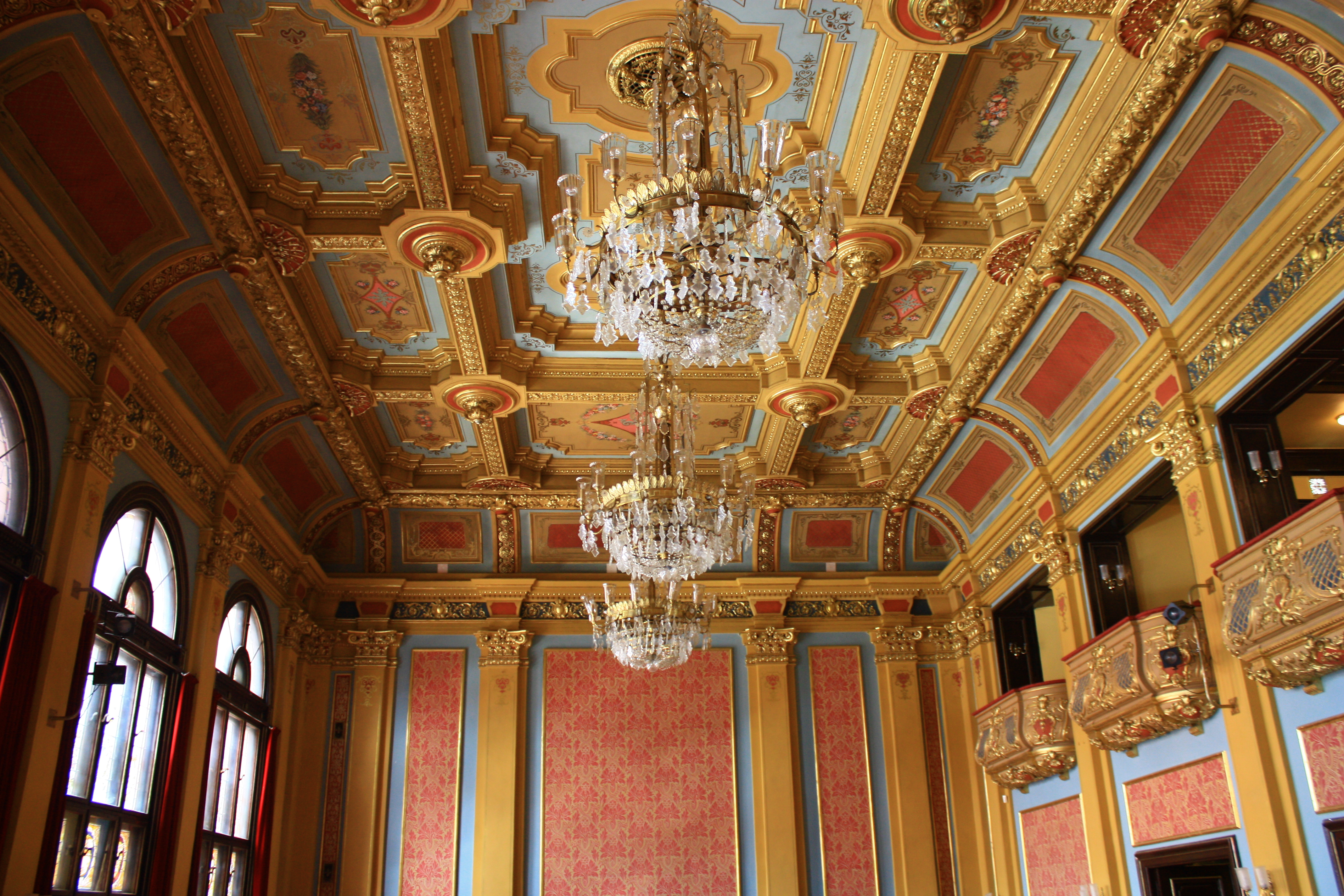 Toruń, Dwór Artusa, 1889-1891